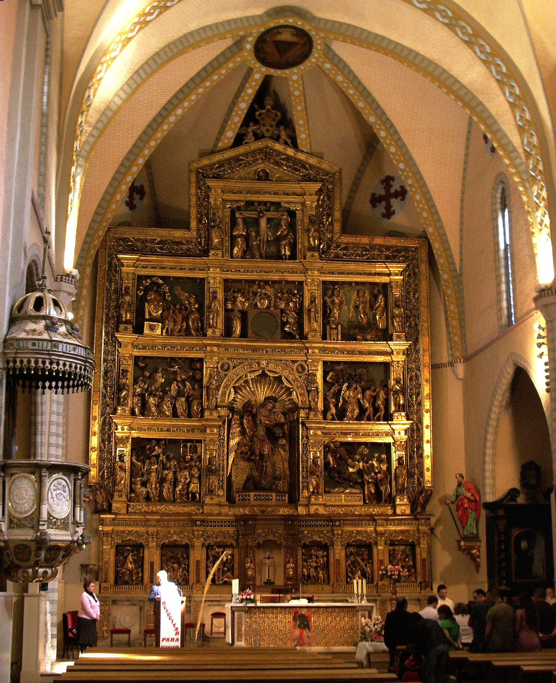 Interior de la Iglesia de San Miguel de los Navarros (Zaragoza, España)